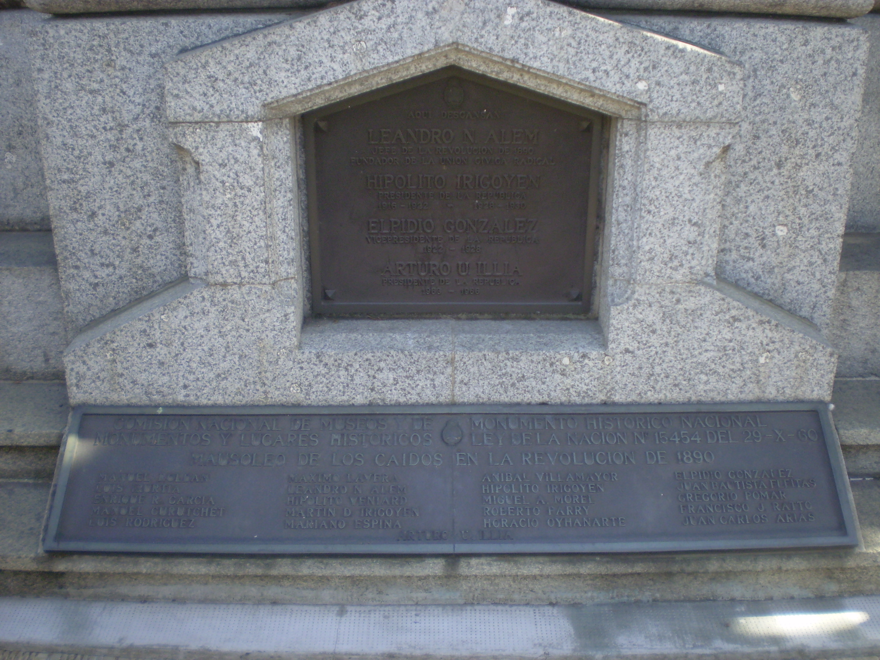 Detalle del Mausoleo de los Caídos en la Revolución de 1890, Cementerio de la Recoleta, Buenos Aires. (Tumba además de Leandro N. Alem, Hipólito Yrigoyen, Elpidio Gonzalez y Arturo U. Illia)